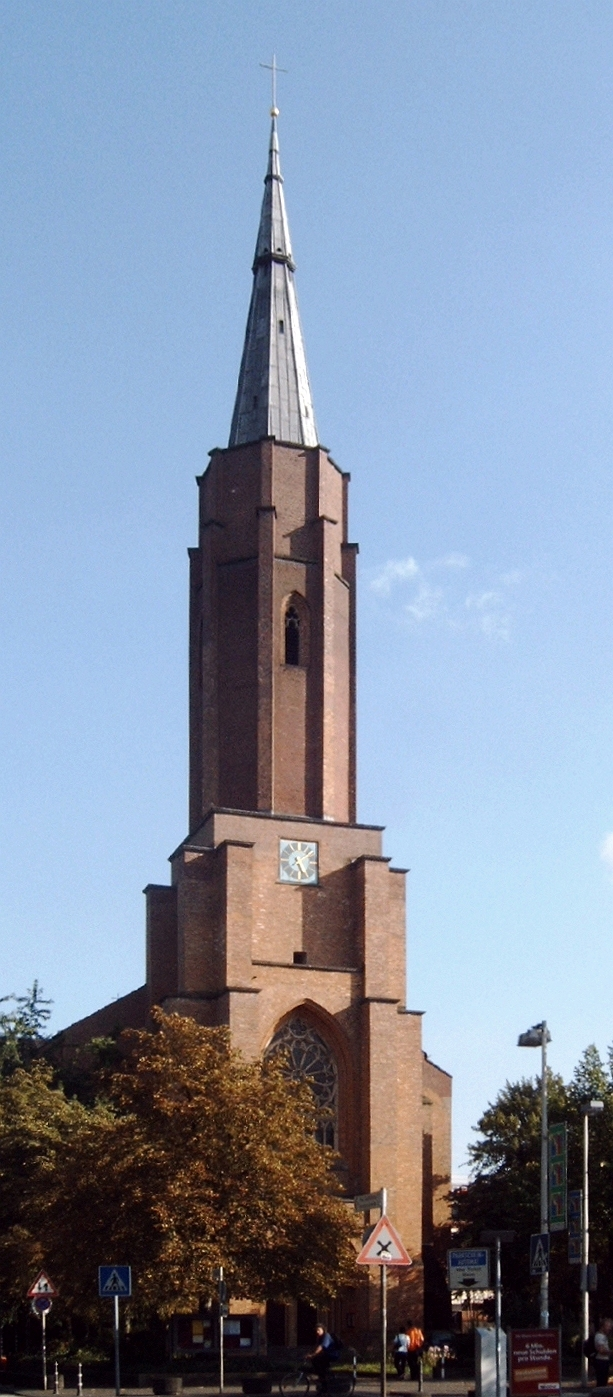 Die evangelische Kreuzkirche in der Bonner Südstadt, Kaiserplatz 1